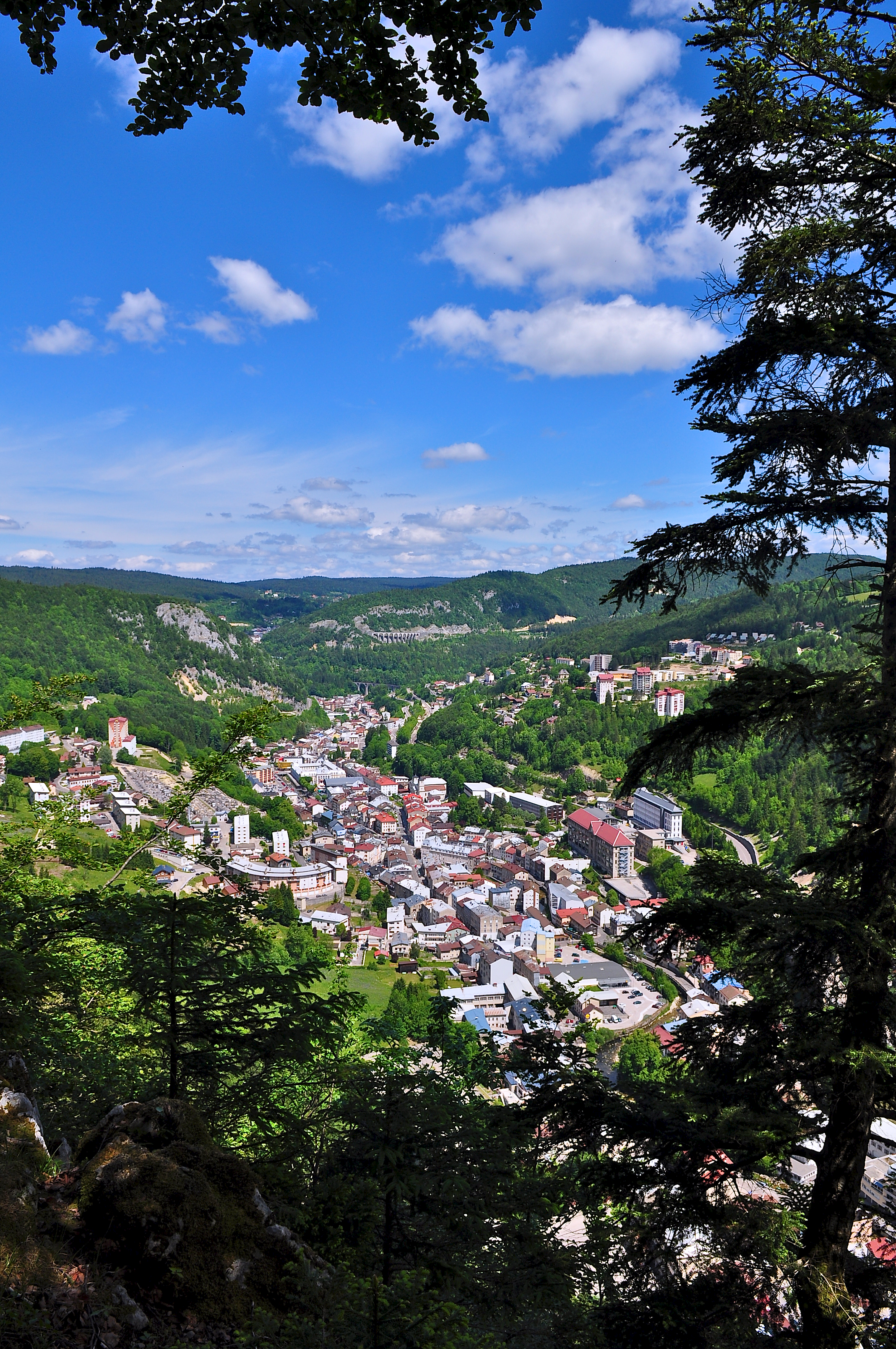 Vue générale de Morez depuis la Riche Fendue